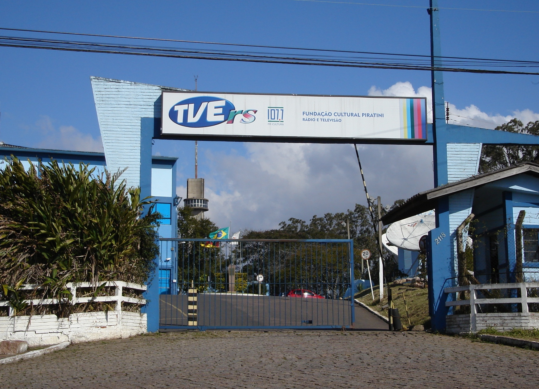 Sede da TV Educativa de Porto Alegre.